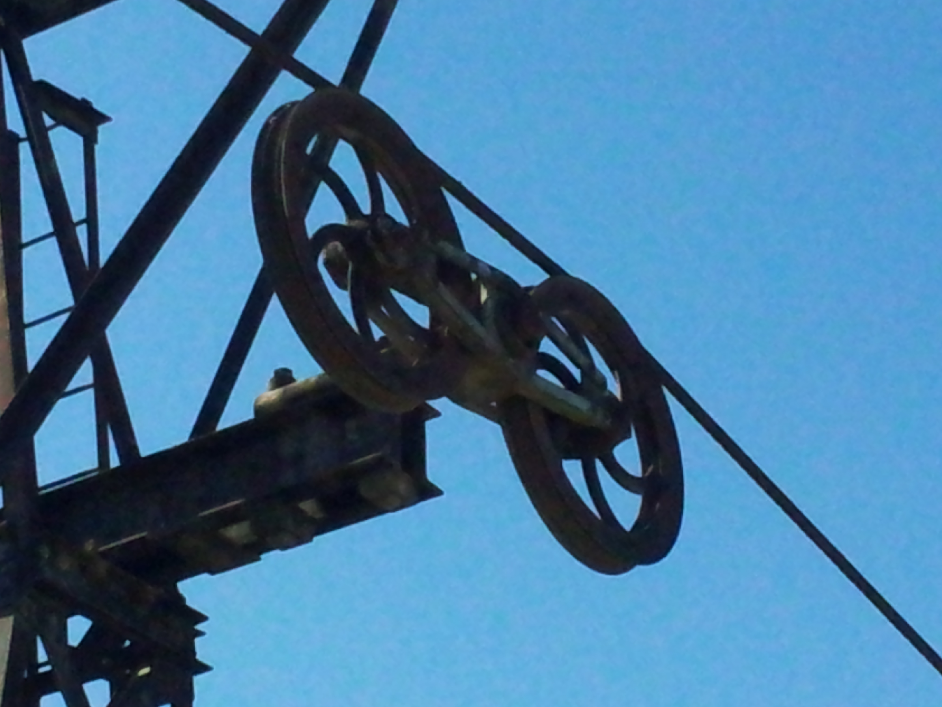 Détail des deux poulies au sommet d'un pylône de l'ancien transporteur aérien Maxéville-Dombasle exposé à l'entrée de la carrière Solvay de Saint-Germain-sur-Meuse.